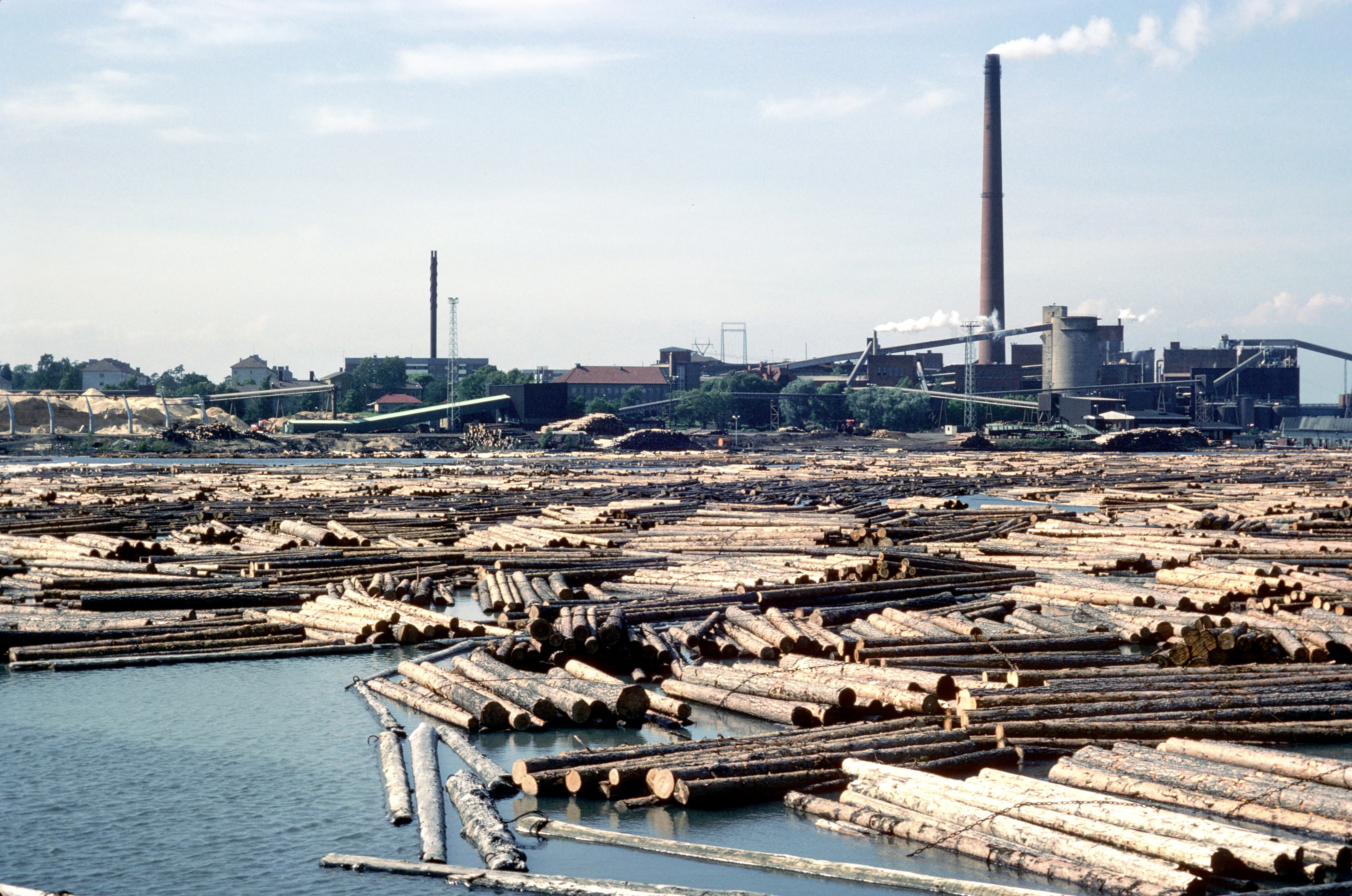 L' usine de transformation de bois Kotkamills Oy. Usine de Kotka. Au premier plan, des grumes flottant dans les bassins de l’ usine qui serviront, à produire, entre autres, de la pâte à papier. Kotkamills Oy est une des principales entreprises finlandaises de fabrication de produits stratifiés. Kotka, Kymenlaakson maakunta (region), Finlande.